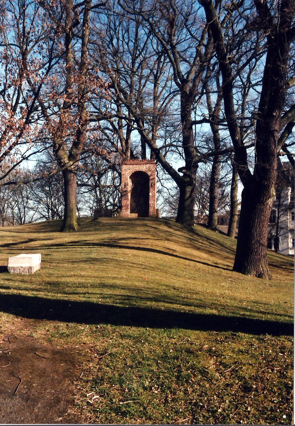 Am Fuße des Jerusalemsberges